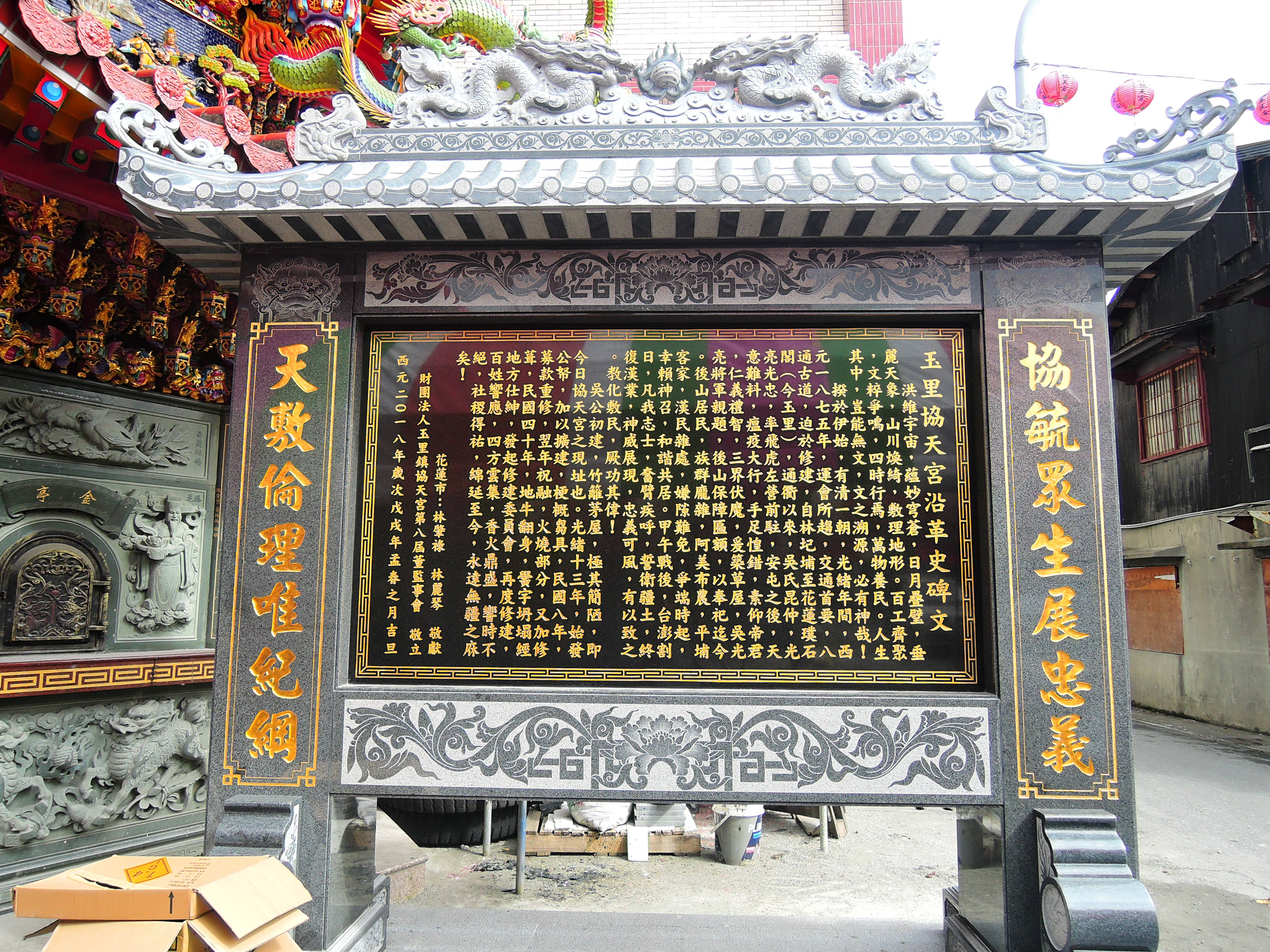 中文（台灣）: 花蓮縣玉里鎮協天宮，主祀文衡聖君關公。